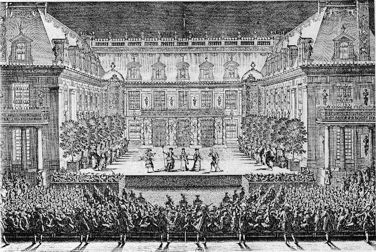 Representación de Alceste de Lully (Versailles 1674).